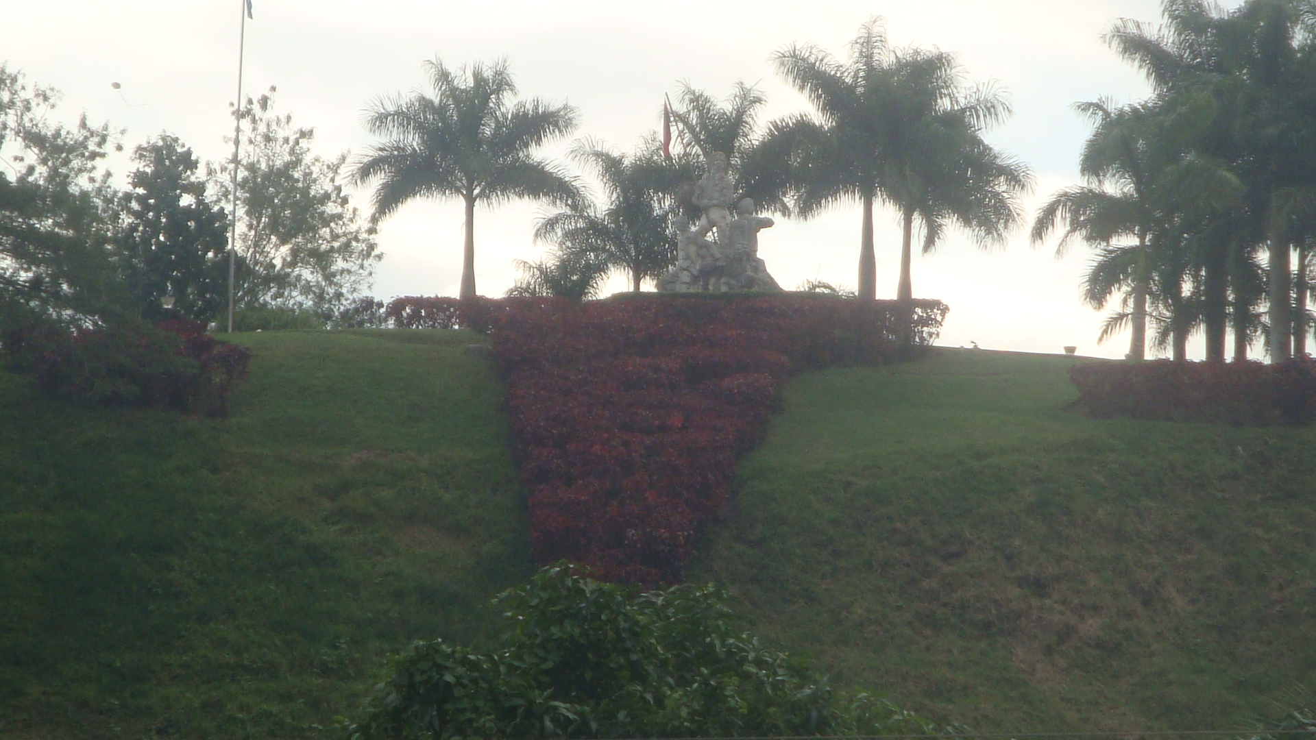 Fotos